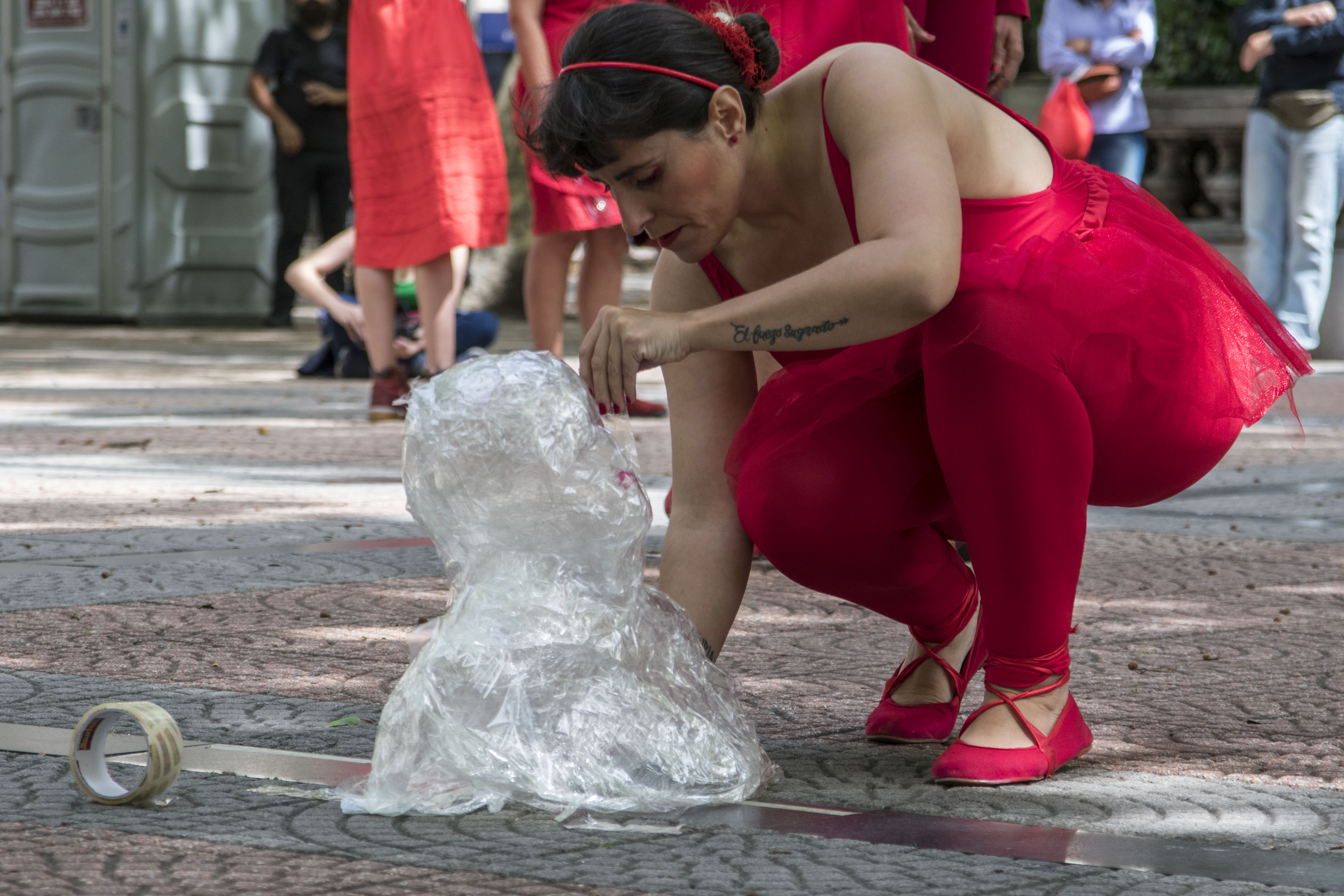 Diez de cada diez - Performance realizada en la Plaza Libertad de Montevideo. Actrices y performers caminan en silencio y en fila hasta llegar a la Plaza Libertad, interpretan fragmentos de distintos libros interpelándonos sobre las concepciones histórico-culturales hegemónicas sobre los cuerpos de las mujeres. Al mismo tiempo relatan algunas estadísticas sobre la violencia de género en Uruguay. Otras mujeres intervienen el silencio utilizando un rollo de cinta adhesiva y un film, afectando el espacio con esculturas como capullos, crisálidas o siluetas transparentes. Montevideo, 8 de marzo de 2019. Huelga Feminista 8M.